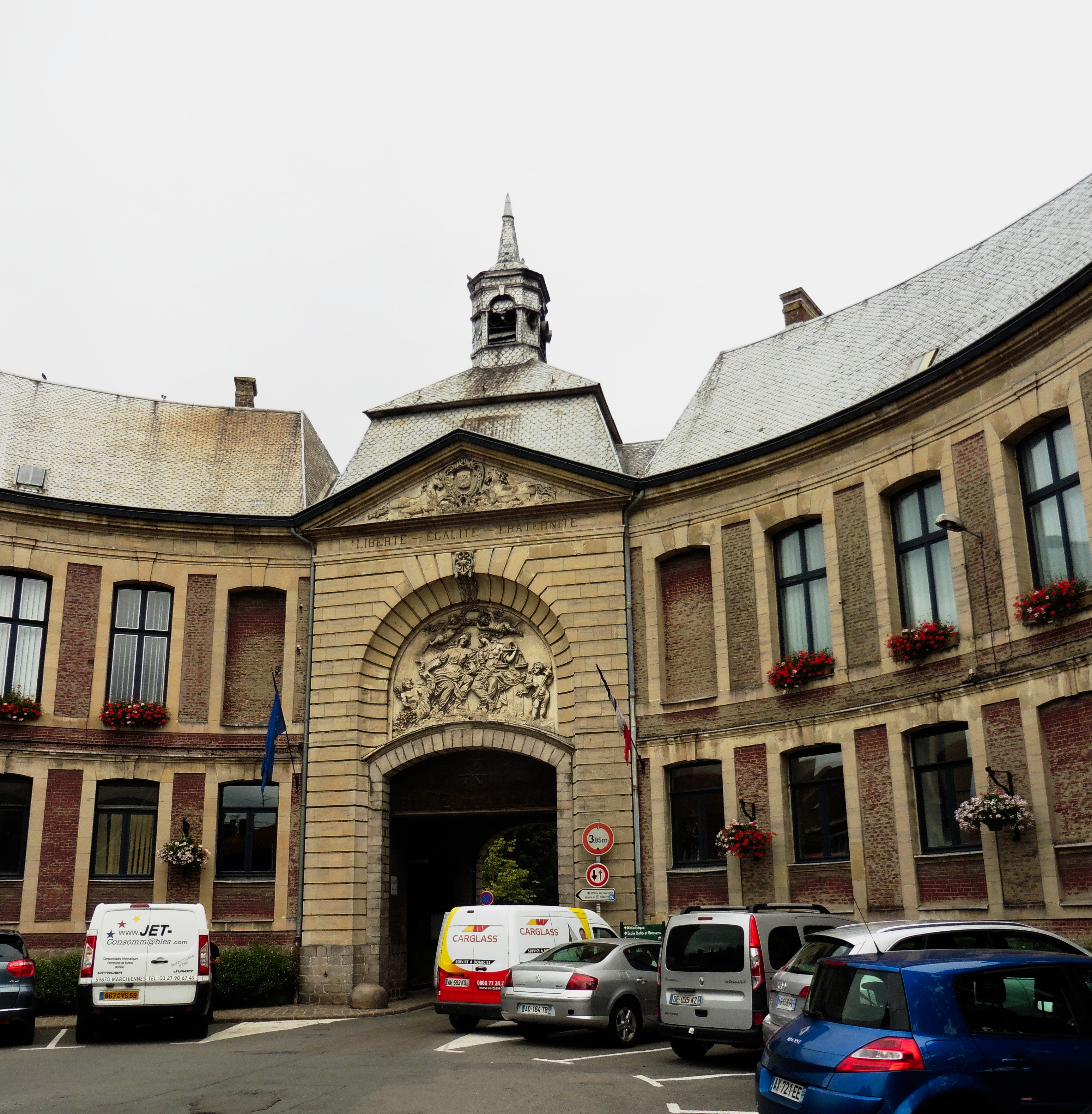 porche de la mairie de Marchiennes dans le Nord région Nord-Pas-de-Calais France.